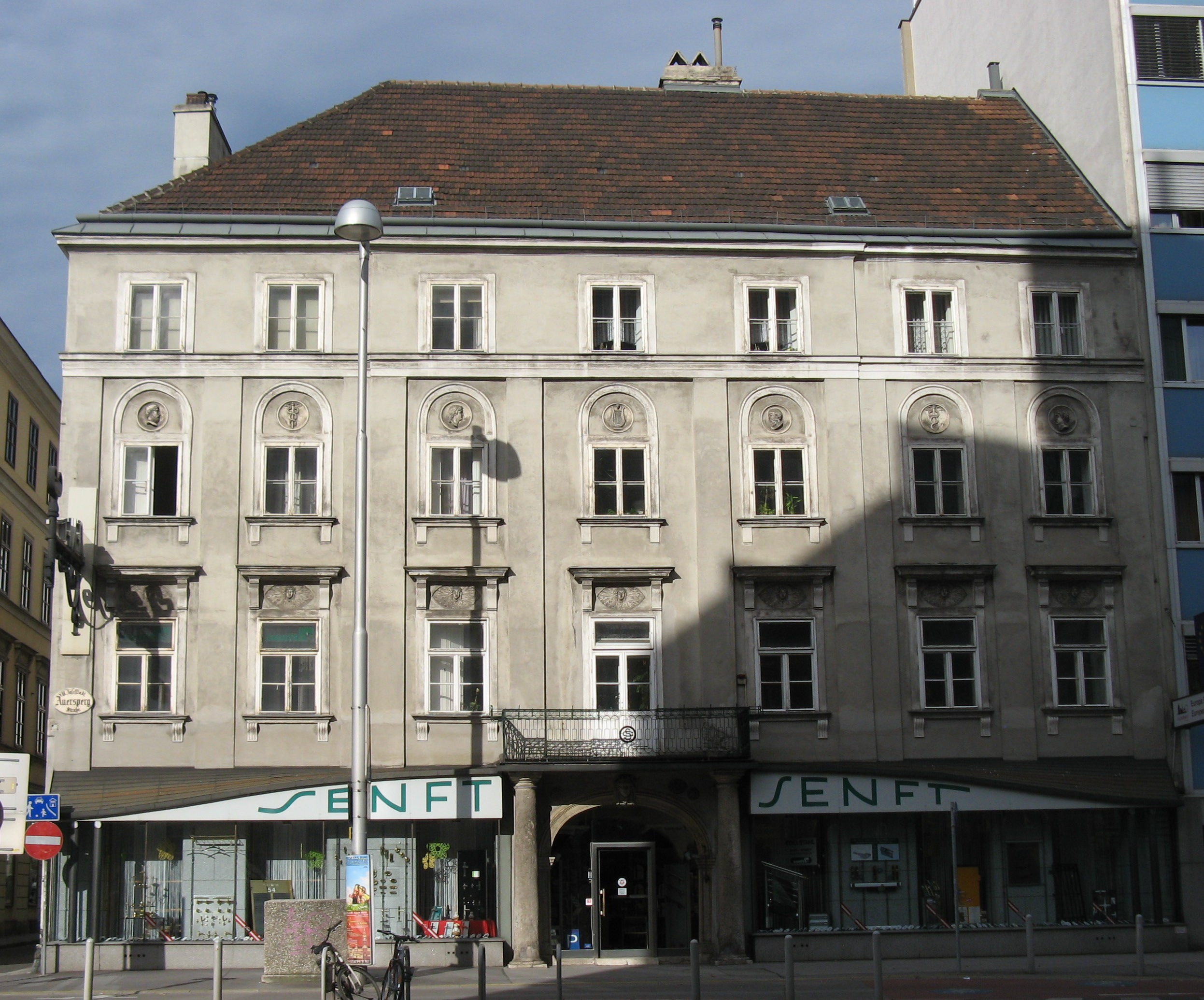 Bei den Schmiedten (1828) von Karl Ehmann, Auerspergstraße 13, Wien-Josefstadt